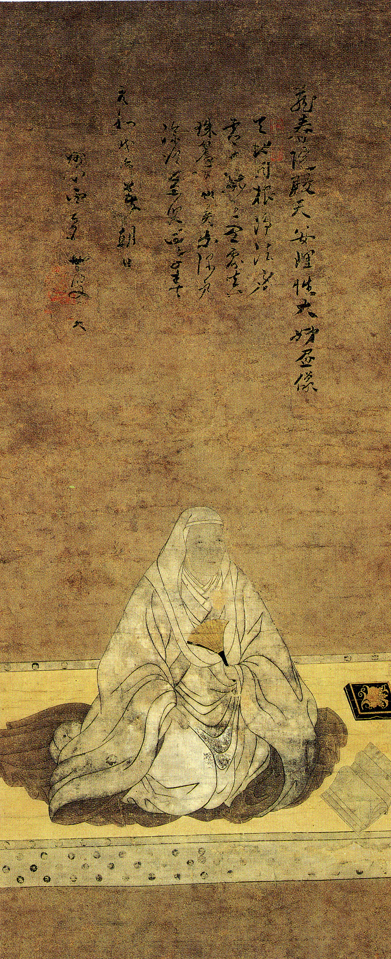 早川殿(?-1613)の肖像画。1618年の著賛があり、没後に供養・追慕の為に描描かれていることがわかる。夫・今川氏真と対になっている。個人像。